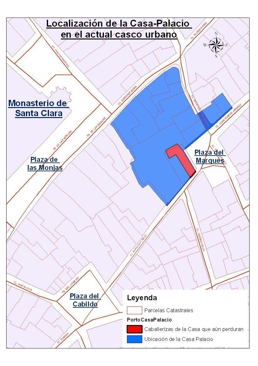 Plano de ubicación de la casa-palacio del Linaje Portocarrero, en el actual casco urbano de Moguer (España).